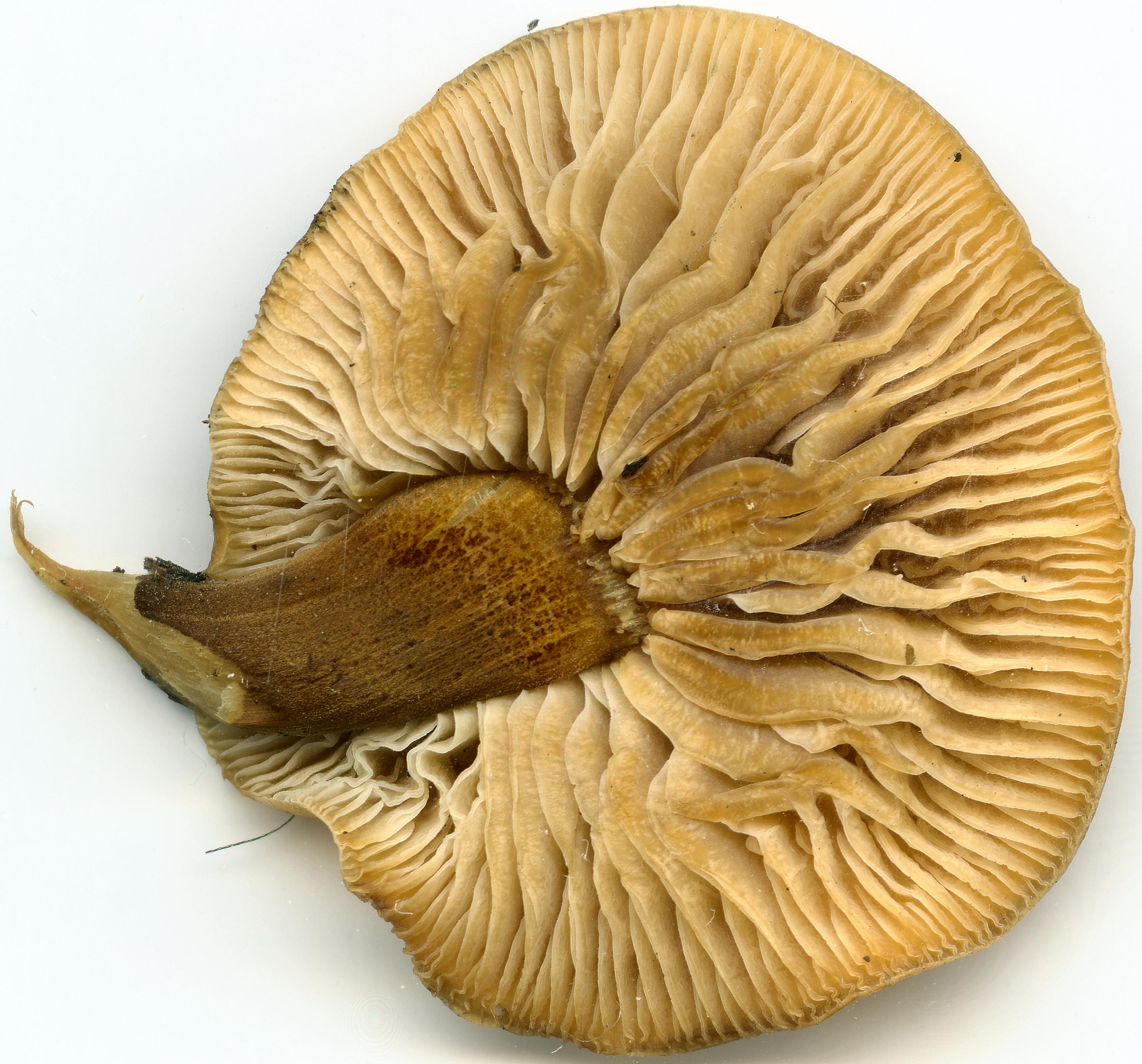 Flammulima velutipes. Kiev, Ukraine